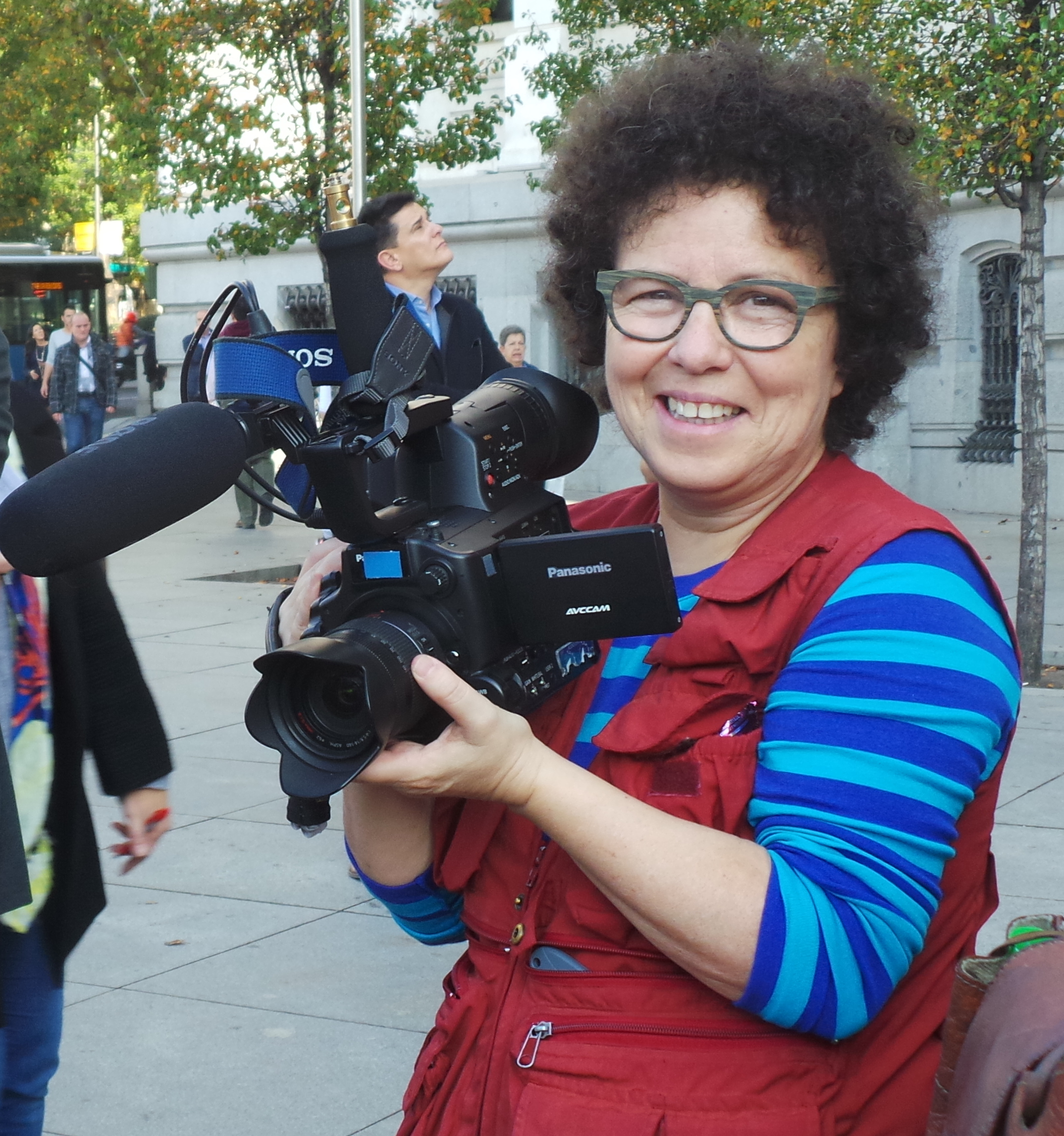 Cecilia Barriga rodando el 7N Marcha Estatal contra las violencias machistas